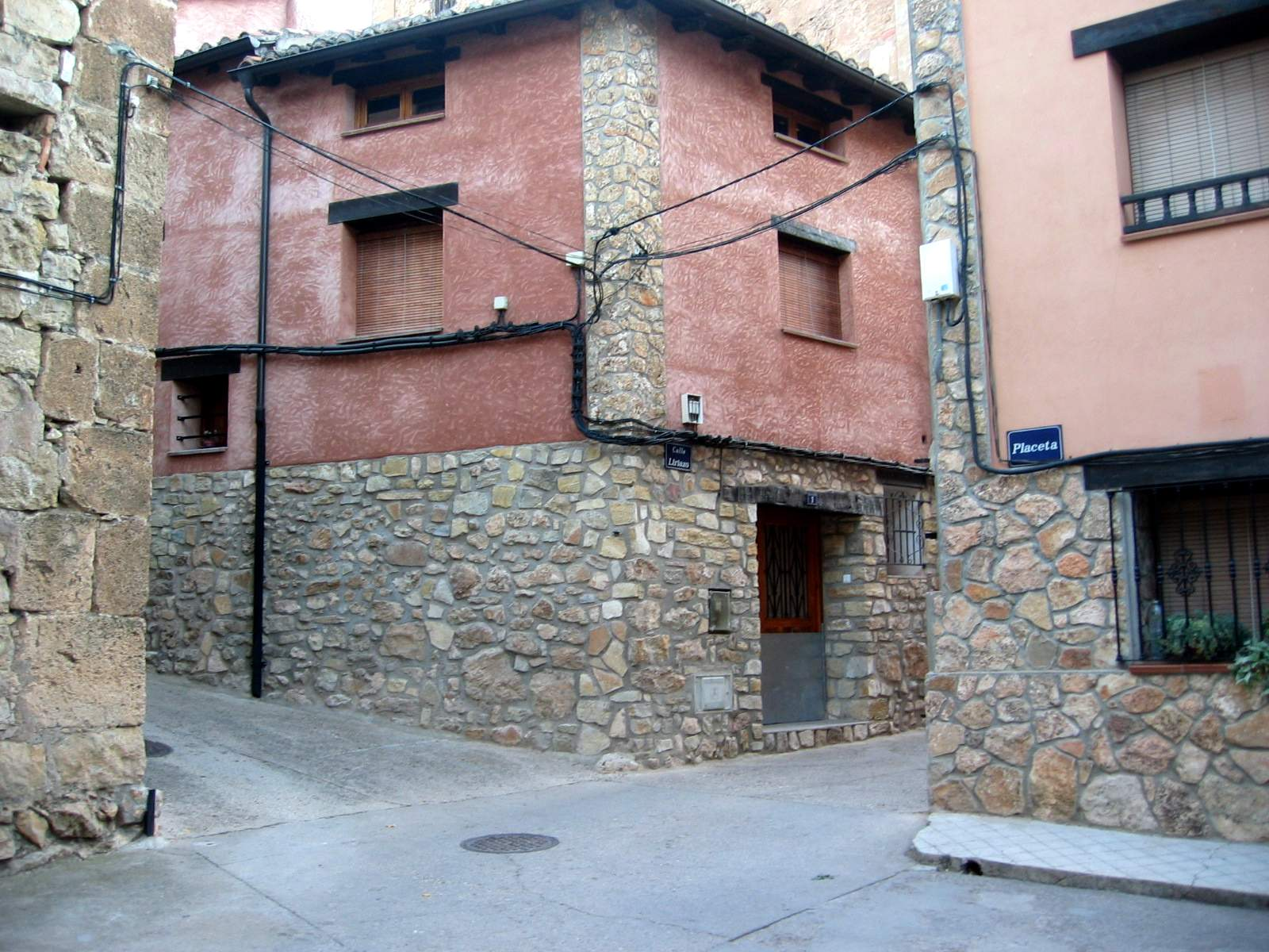 Vista de construcciones tradicionales rehabilitadas en la plazuela y calle Liriazo de El Cuervo (Teruel).